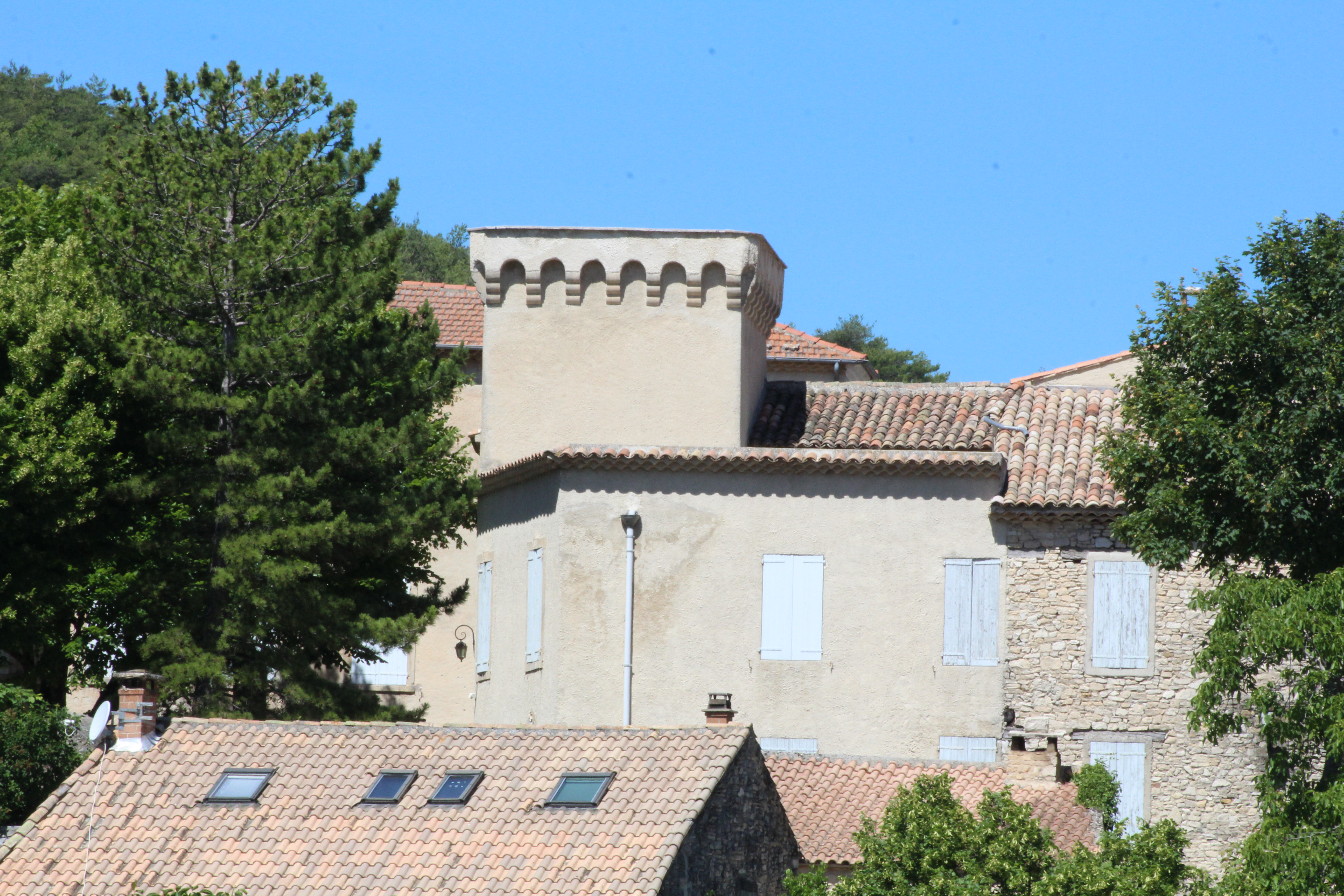 Château de Fontienne.